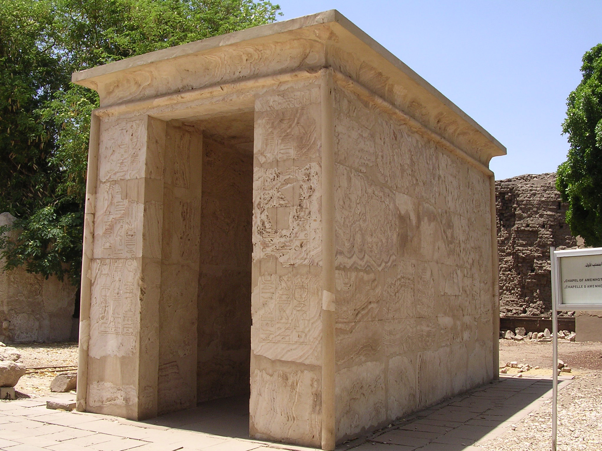 I. Amenhotep alabástrom kápolnája (Karnak, Szabadtéri múzeum)